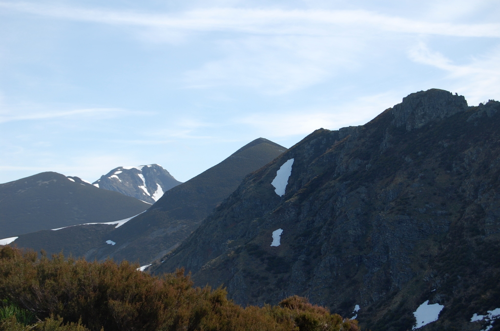 Ancares, Degrada a Piornedo, Cervantes. Mustallar, Galiza